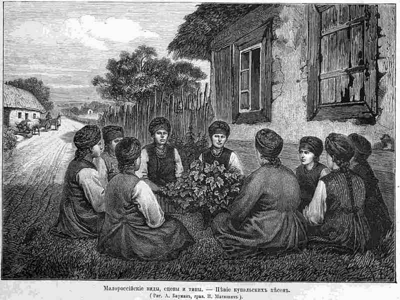 Пение купальских песен. "Всемирная иллюстрация", №39, 1879.